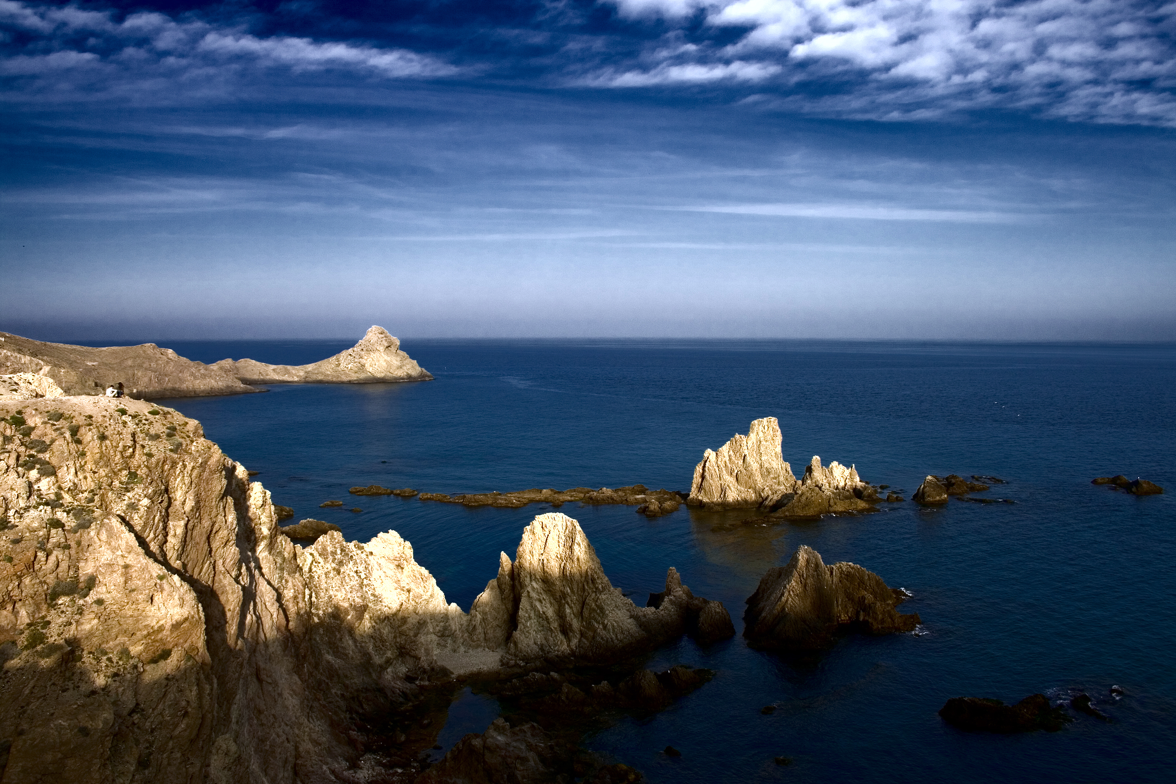 Cabo de Gata, Almería. Se puede ver en